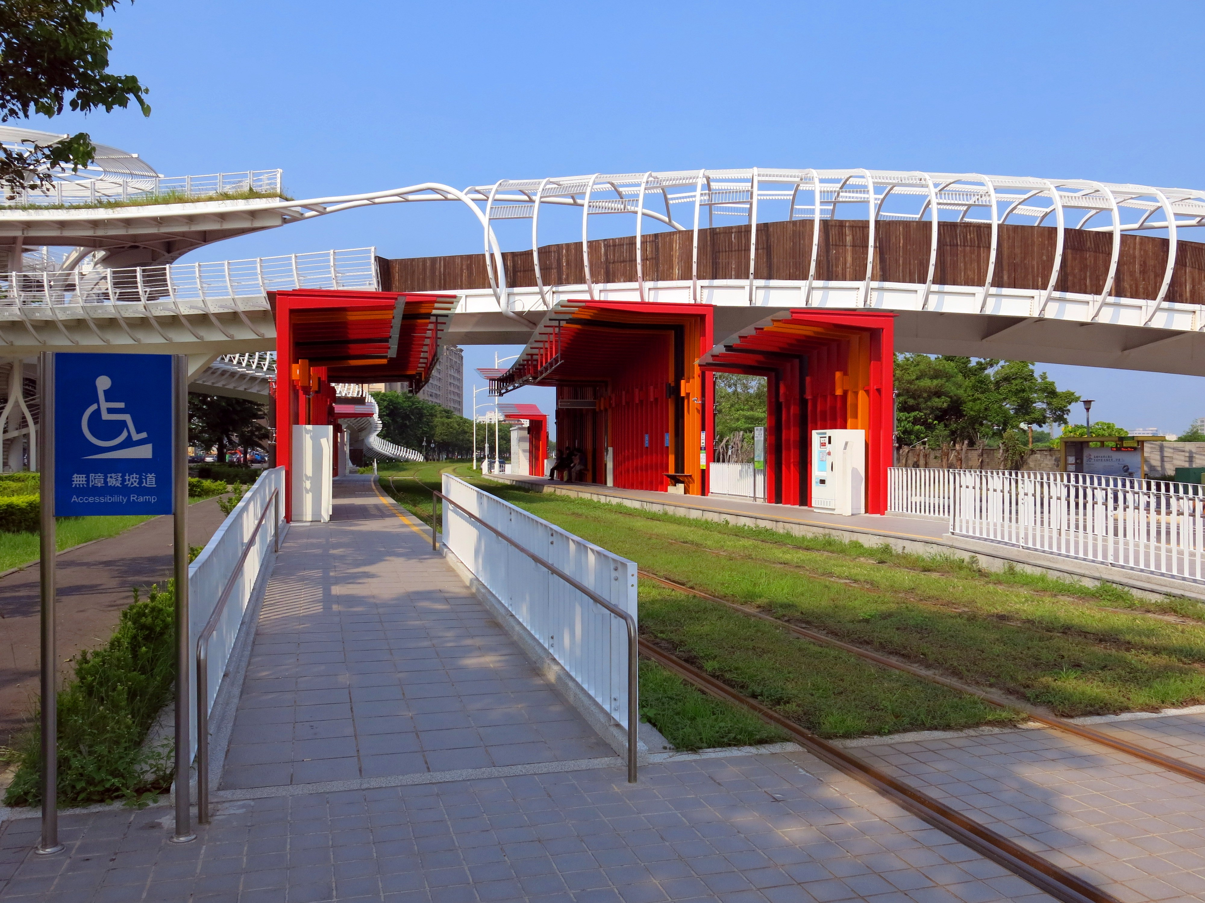 中文（台灣）: 高雄輕軌前鎮之星站